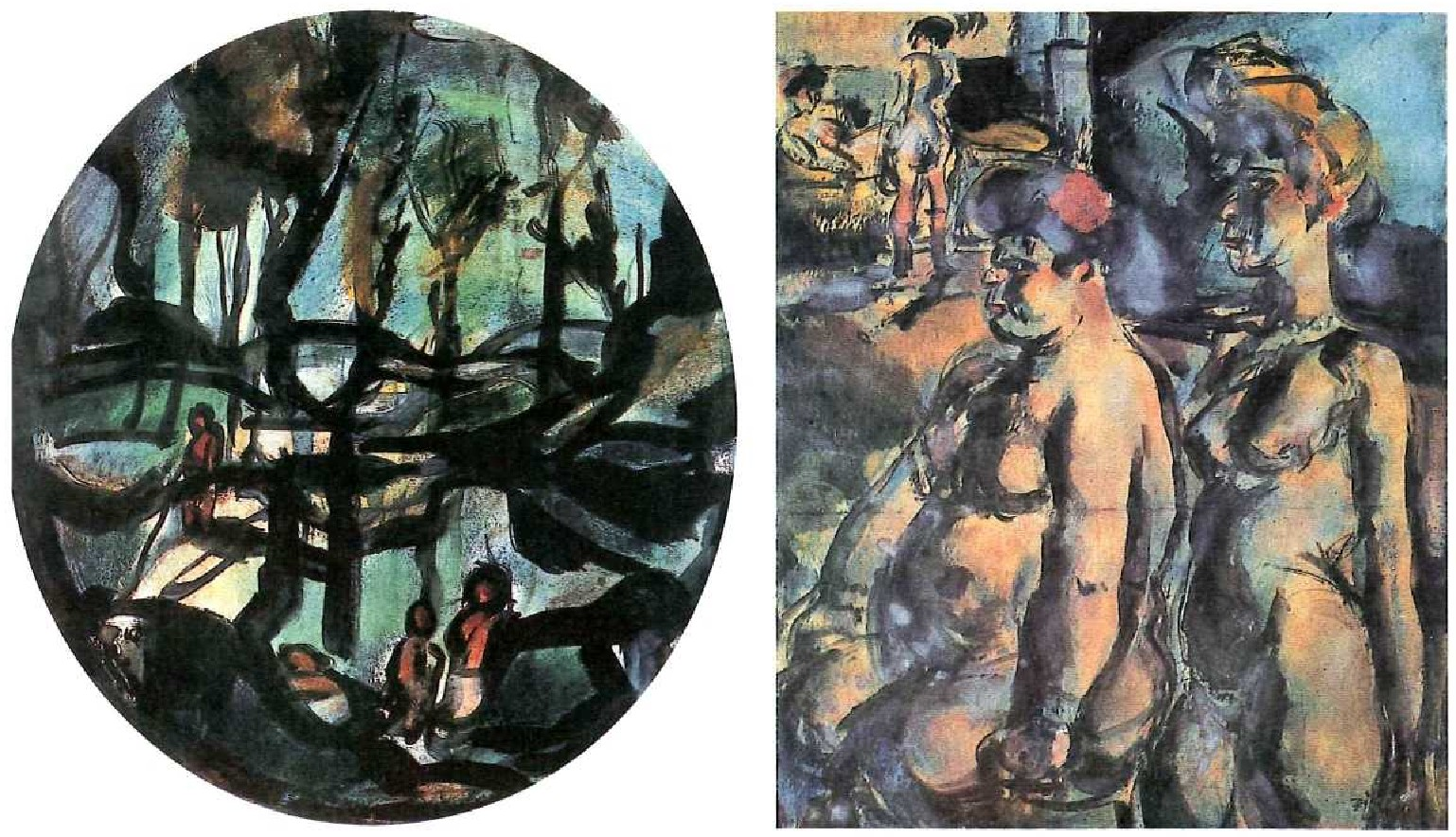 Georges Rouault margolari independentearen bi obra, San Petersburgoko Ermitage museoan ikusgai biak. Ezkerrean, Udaberria (1911). Eskuinean, Emagalduak